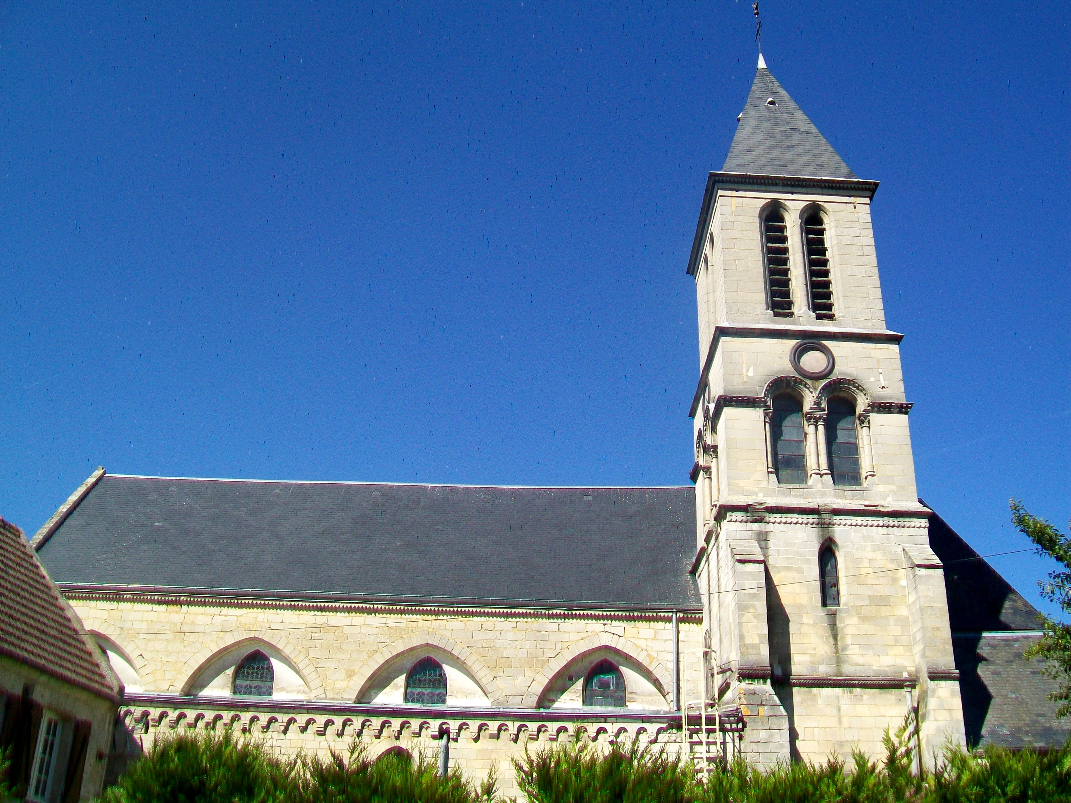 La façade méridionale ; donnant sur des terrains privés, elle n'est que partiellement visible depuis la rue.